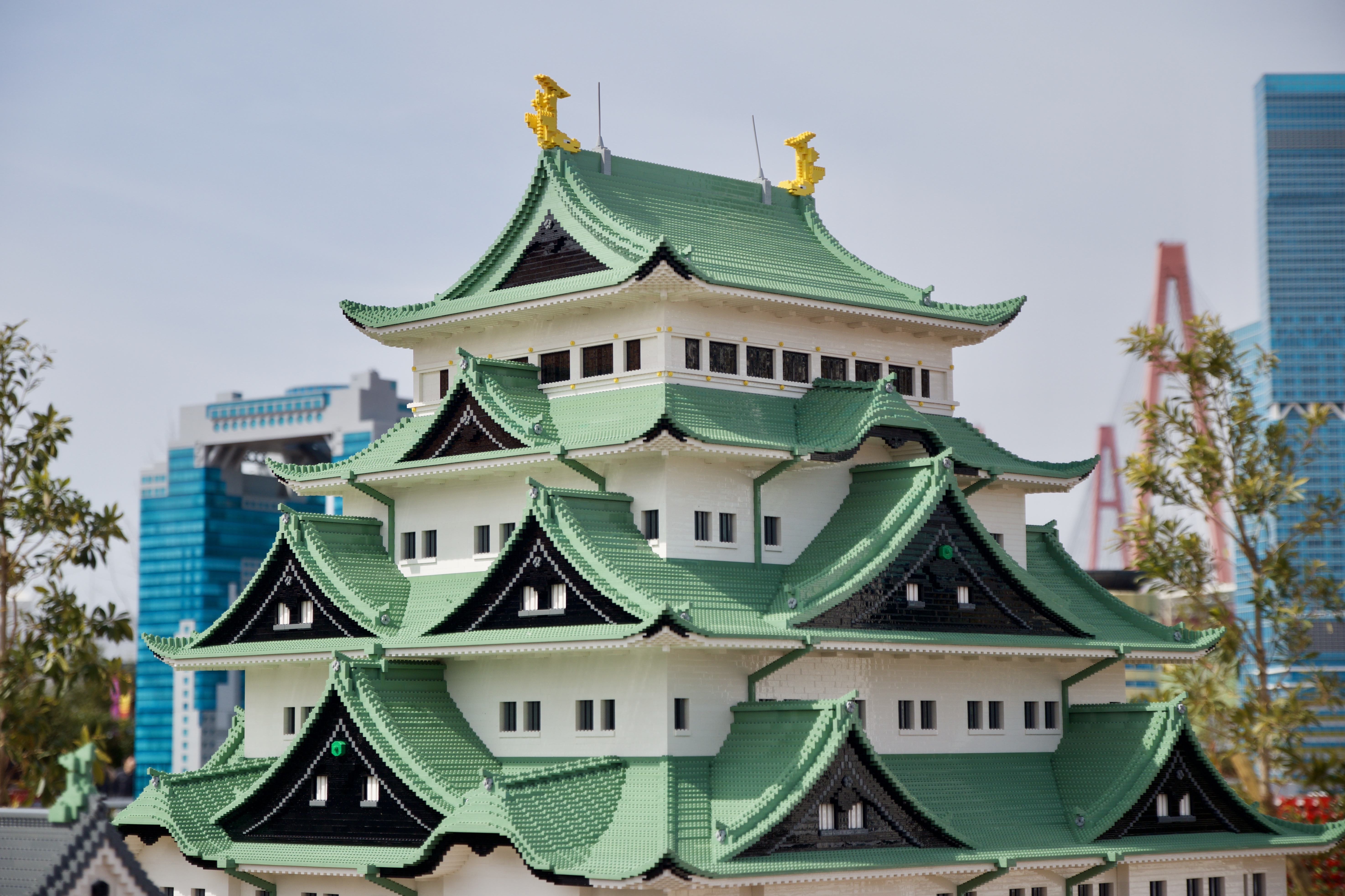 レゴランドジャパン ミニランド 名古屋城